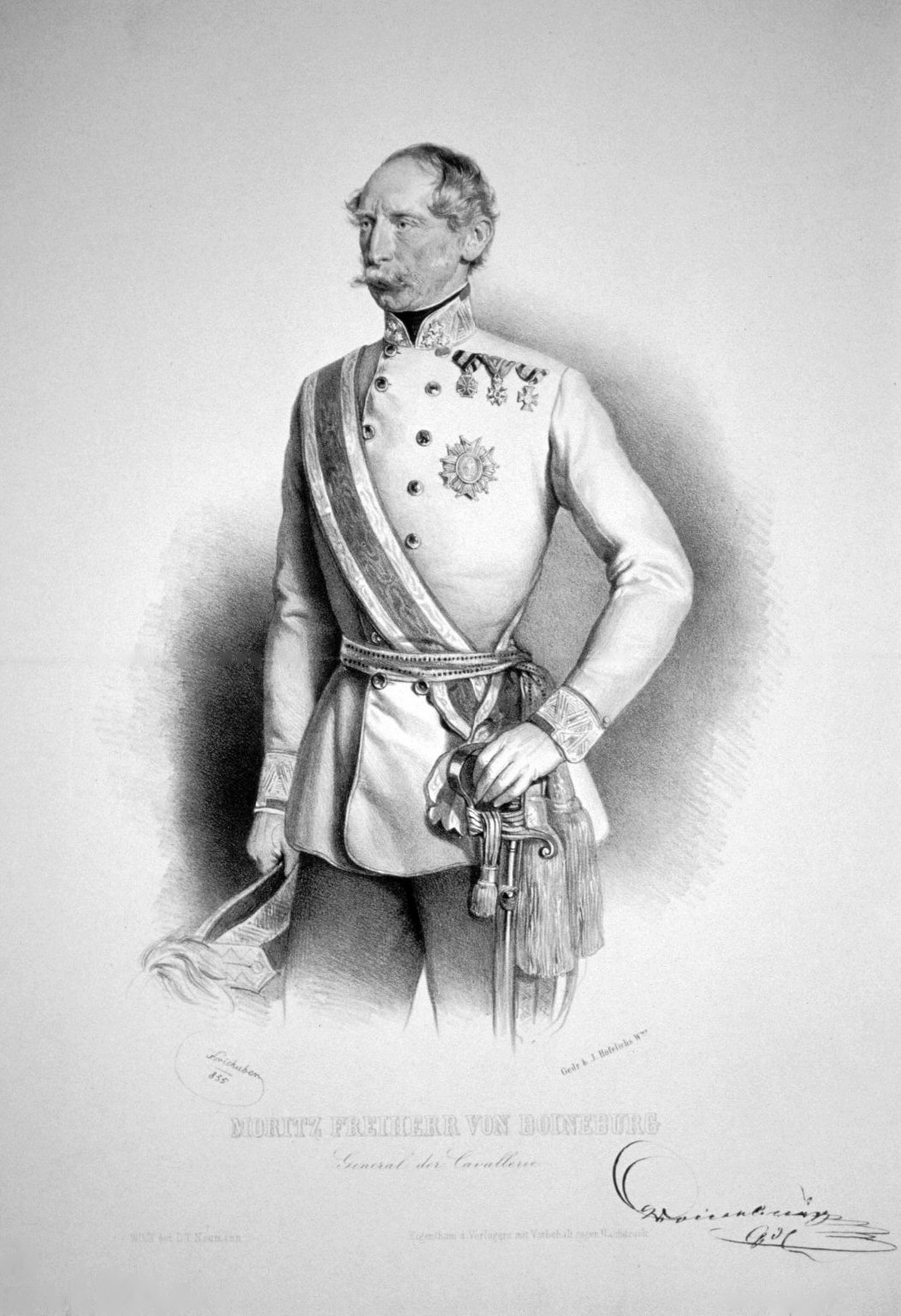 Moritz Boineburg, Freiherr von Lengsfeld (1788-1868), zuletzt General der Kavallerie. Lithographie von Josef Kriehuber, 1855